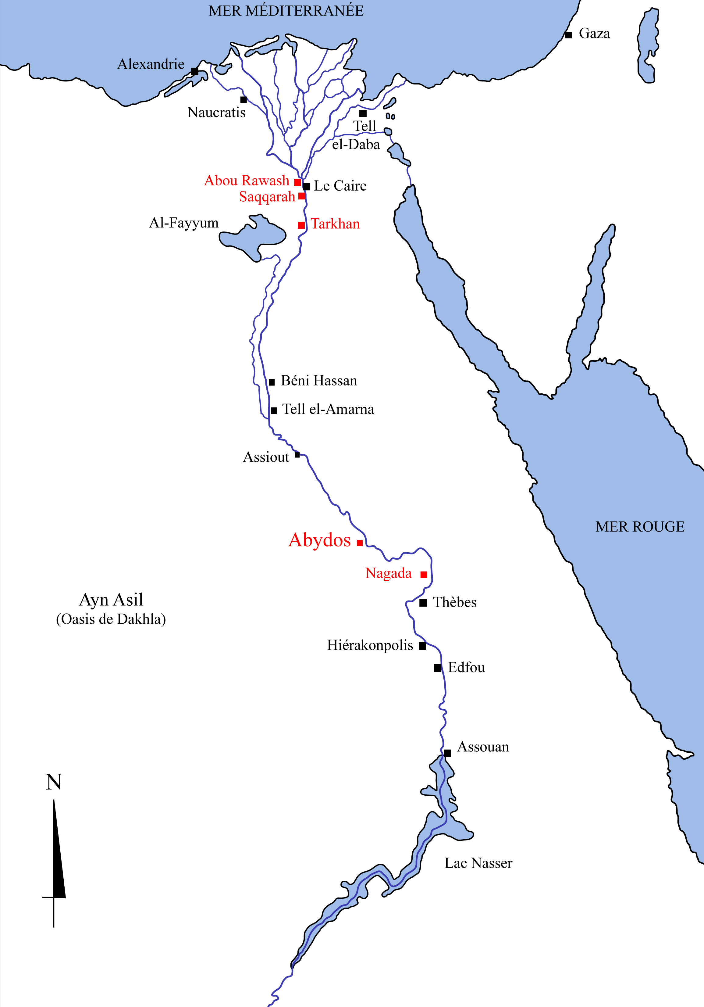 Positions des principaux sites funéraires de l'époque archaïque égyptienne.